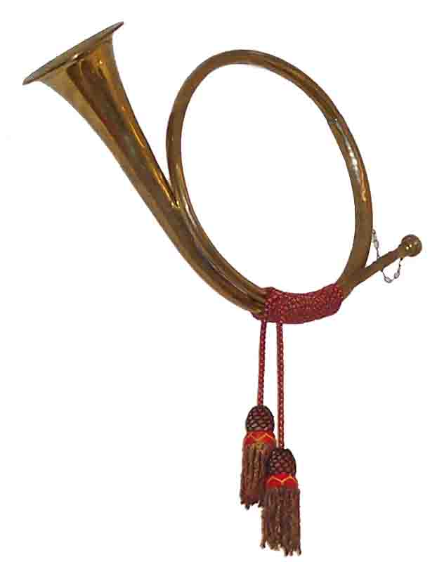 echtes altes Posthorn Aufnahmeort: Rheinhessisches Postmuseum in Erbes-Büdesheim, Deutschland